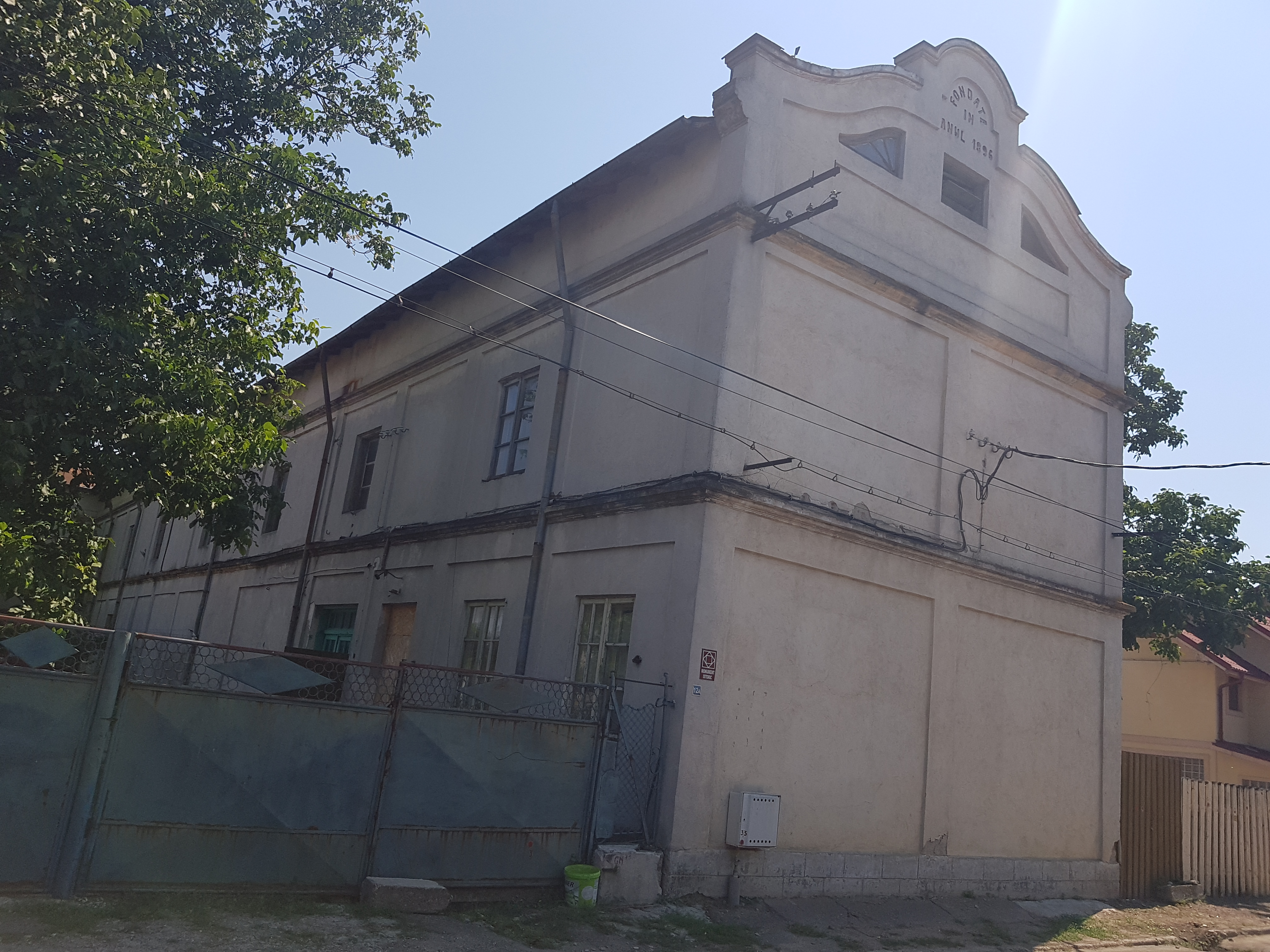 Tăbăcăria Tăchiță Nistor